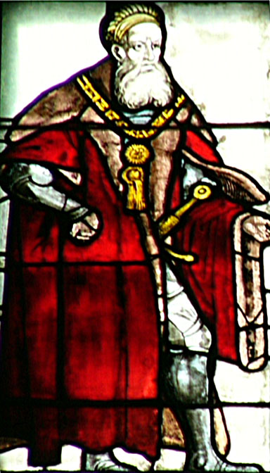 Ausschnitt aus dem Markgrafenfenster von St. Sebald in Nürnberg: Markgraf Friedrich der Ältere